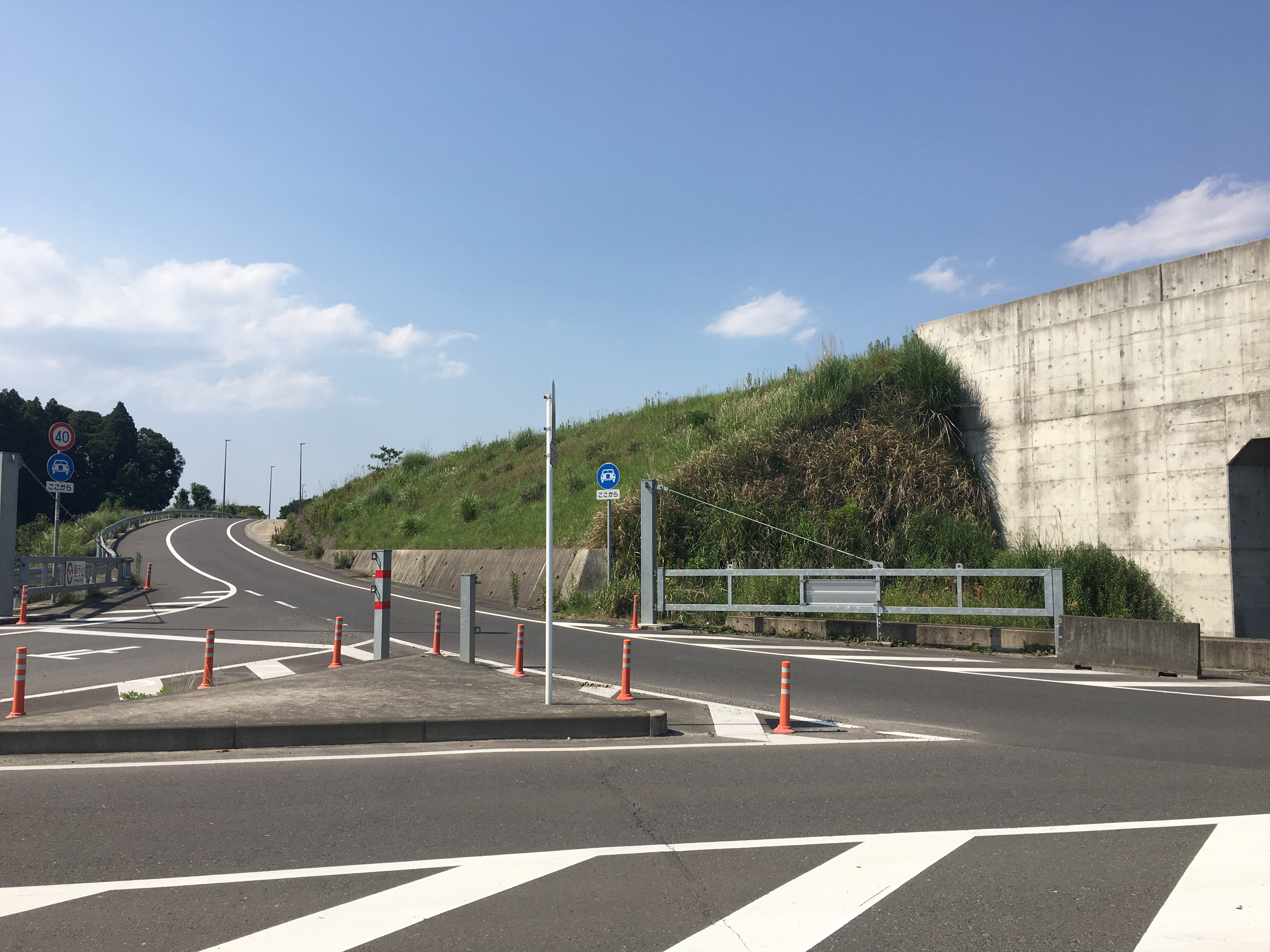 梅北インターチェンジの都城方面インランプ